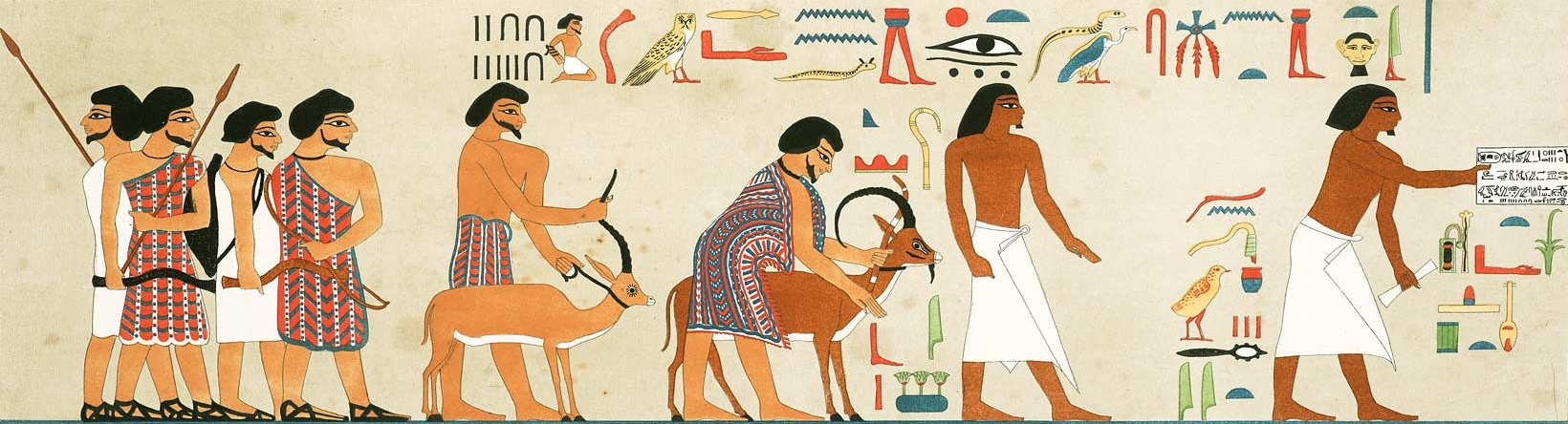 Detail der Nordwand des Grabes BN 3 des Chnumhotep II. in Beni Hassan, Ägypten